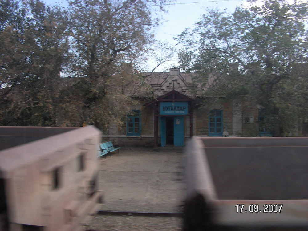 Станция Мугалжар (Мугоджарская)